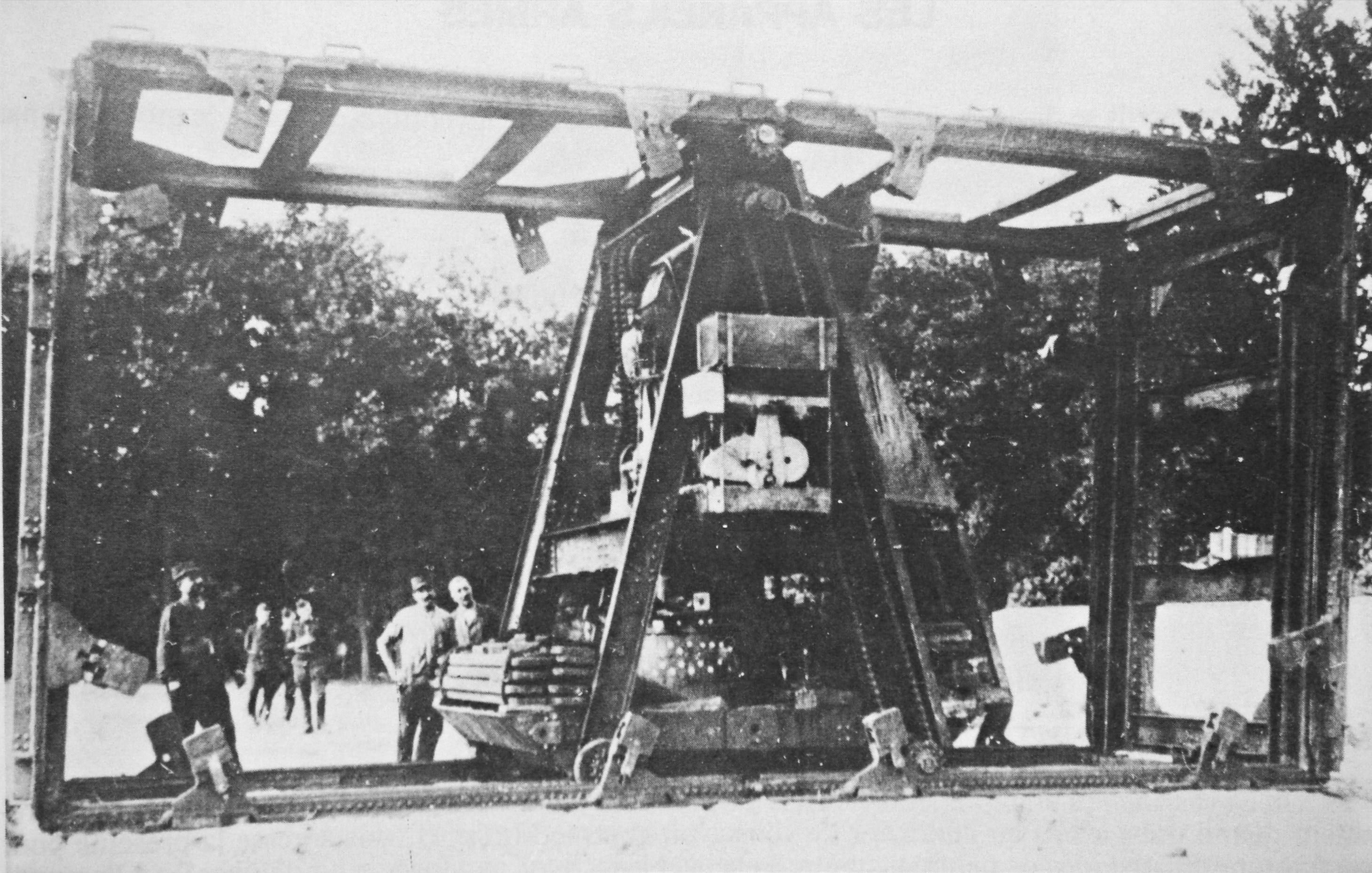 Appareil Boirault 1914